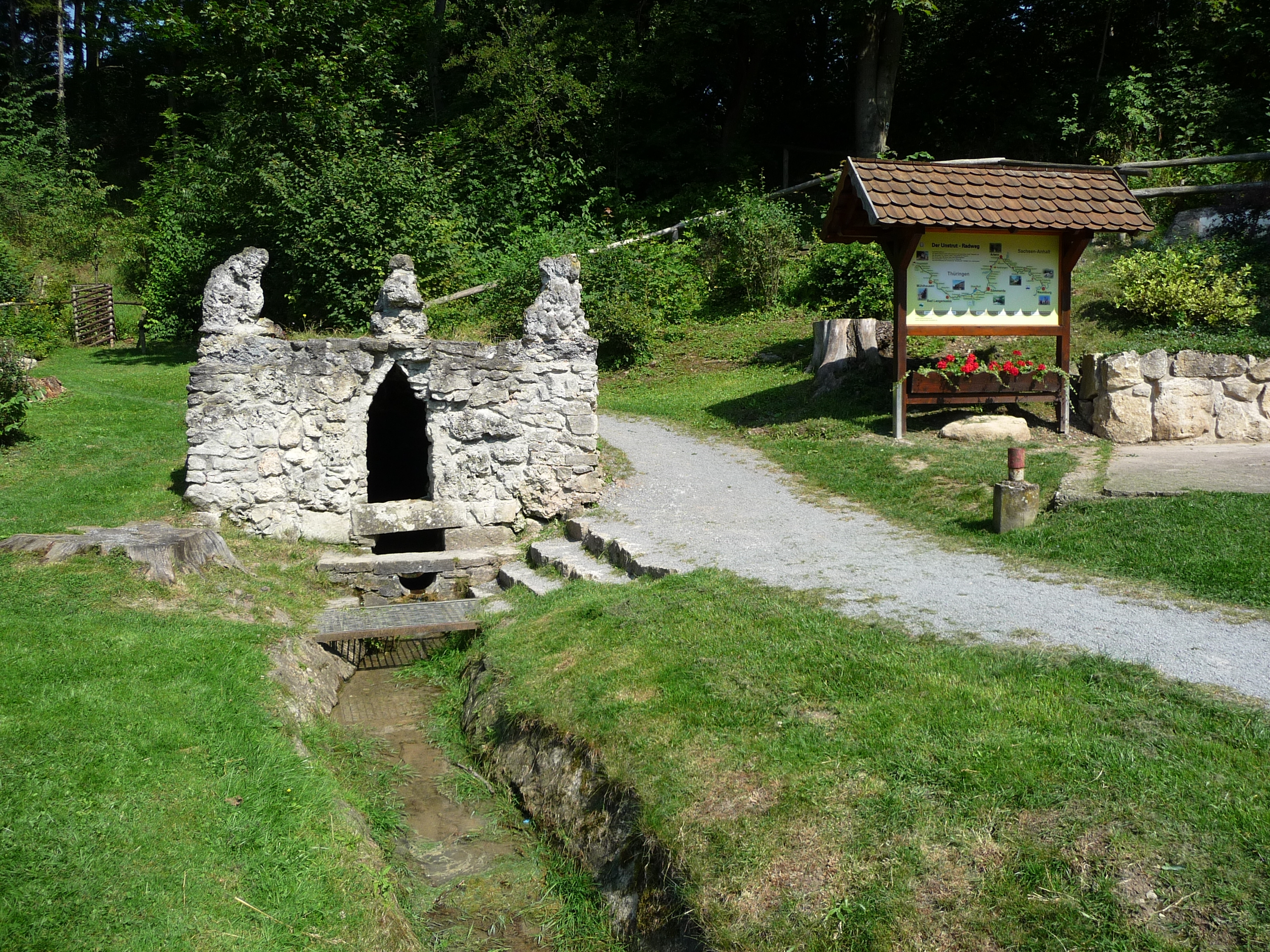 Unstrut-Quelle